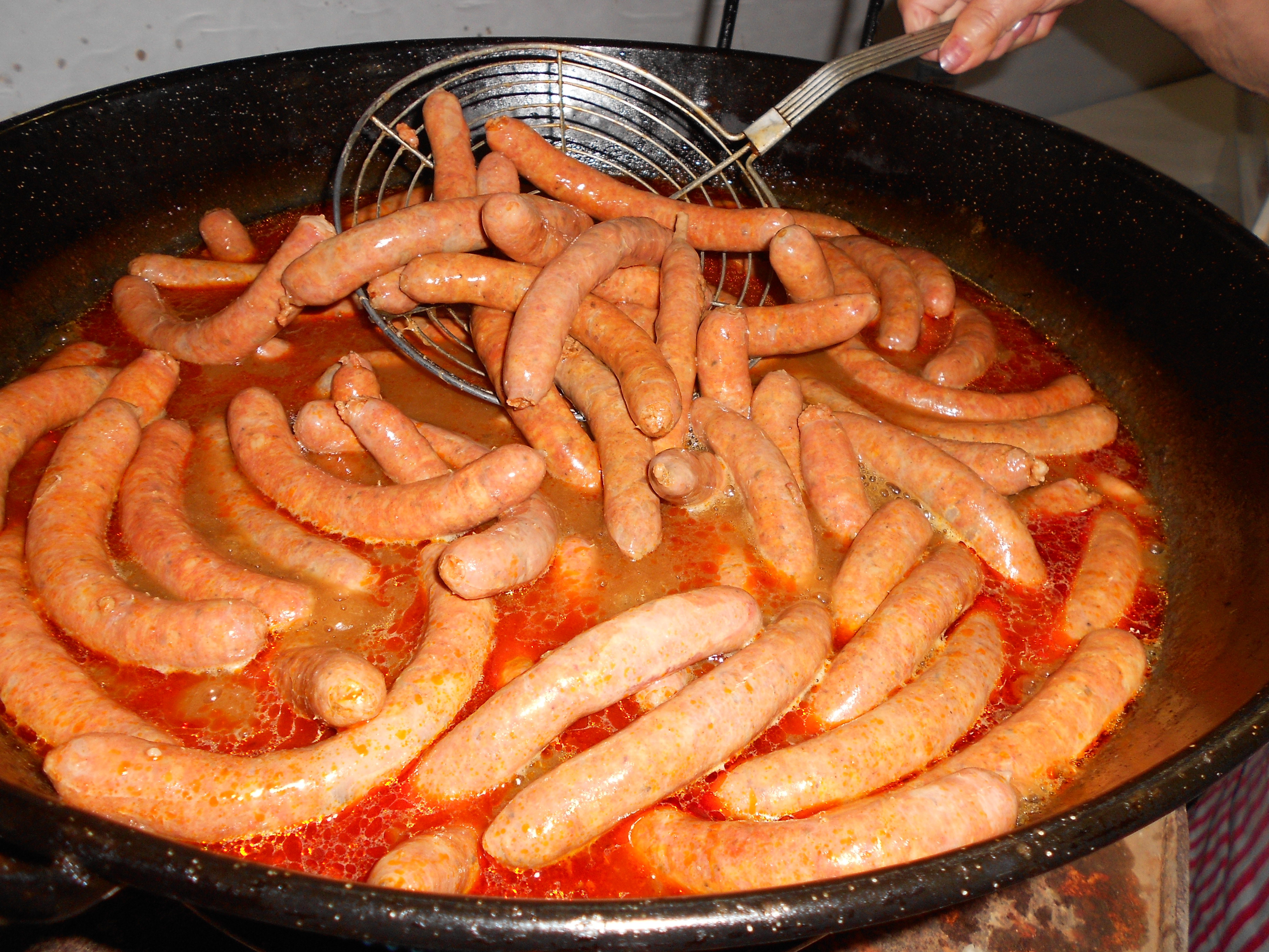 Salchichas de Zaratán cocinadas en vino, en la la degustación que ofrece el ayuntamiento durante la fiesta de la salchicha.